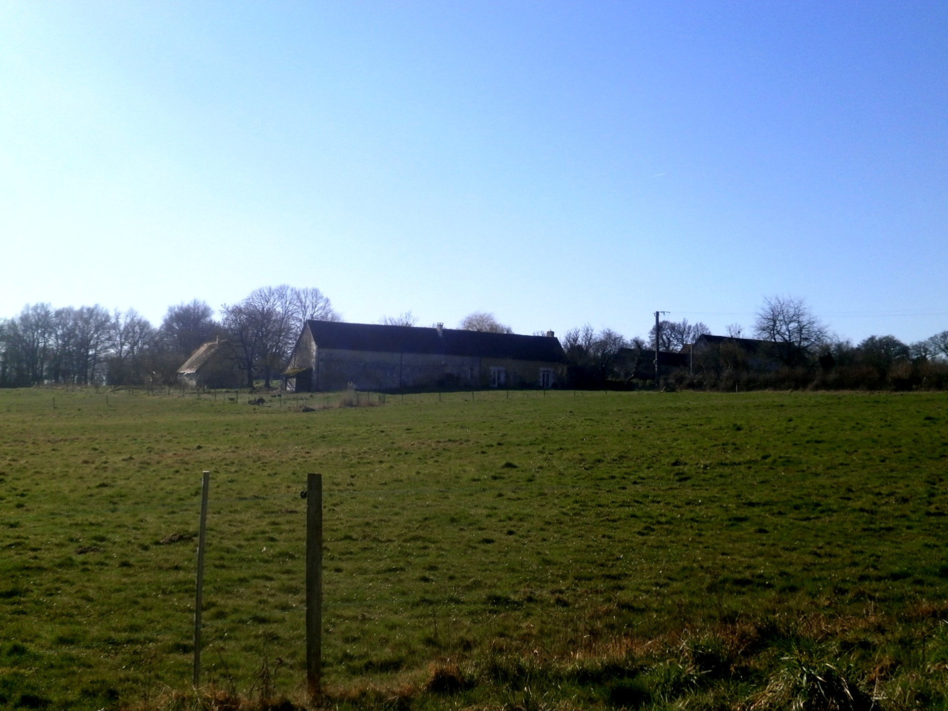 Le hameau d'Aubigny (ancienne paroisse de Loché-sur-Indrois)